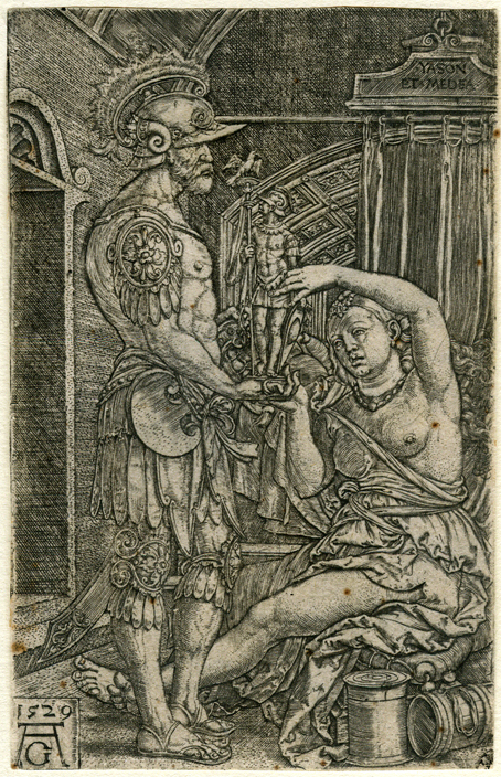 Aldegrever, Heinrich 1502-1555/61: Medea reicht Jason die Statuette eines Kriegers [Medea delivering a statue of a man to Jason - Apollodorus, Argonautica III, 1042-53], 1529. Kupferstich/engraving, in der Platte monogrammiert “AG” und datiert. Blattgröße 11.6 x 7.4 cm. (Plattenränder knapp beschnitten; vereinzelte Stockflecken; eine Stelle etwas dünn). New Hollstein 65. Etwas zarter Druck.